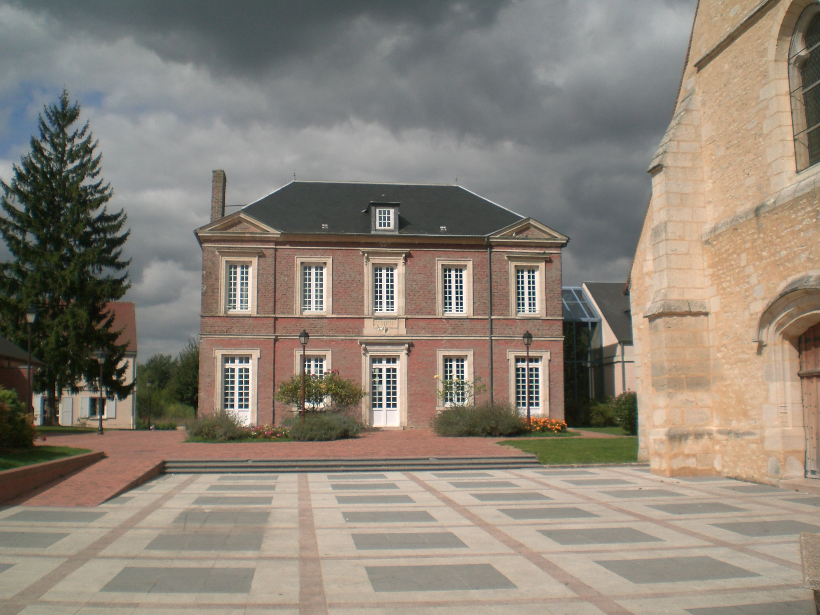 mairie de bornel oise france